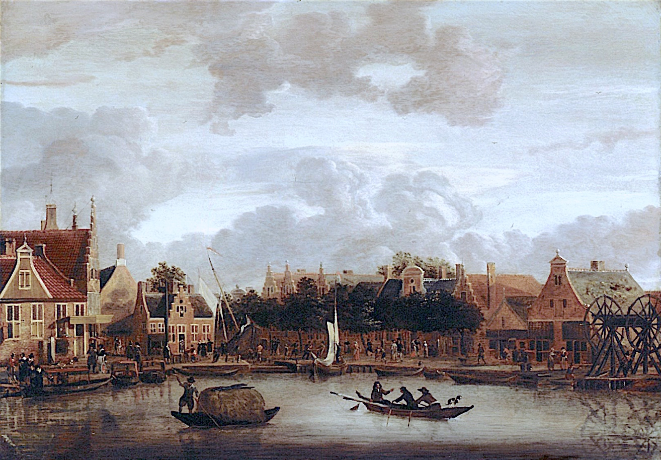 Het einde van de Overtoom, gezien in zuidelijke richting Links de herberg Het Hof van Holland (Overtoom 591) met rechts daarvan het begin van de Amstelveenseweg. In het midden het Leidse Veerhuis, met rechts daarvan de overtoom naar de Schinkel. Rechts huizen aan de Sloterkade. Het vierde pand van rechts is het Aalsmeerder Veerhuis (Sloterkade 21). Geheel rechts vooraan het einde van de Kostverlorenvaart. Datering voorstelling: 1660-1670.